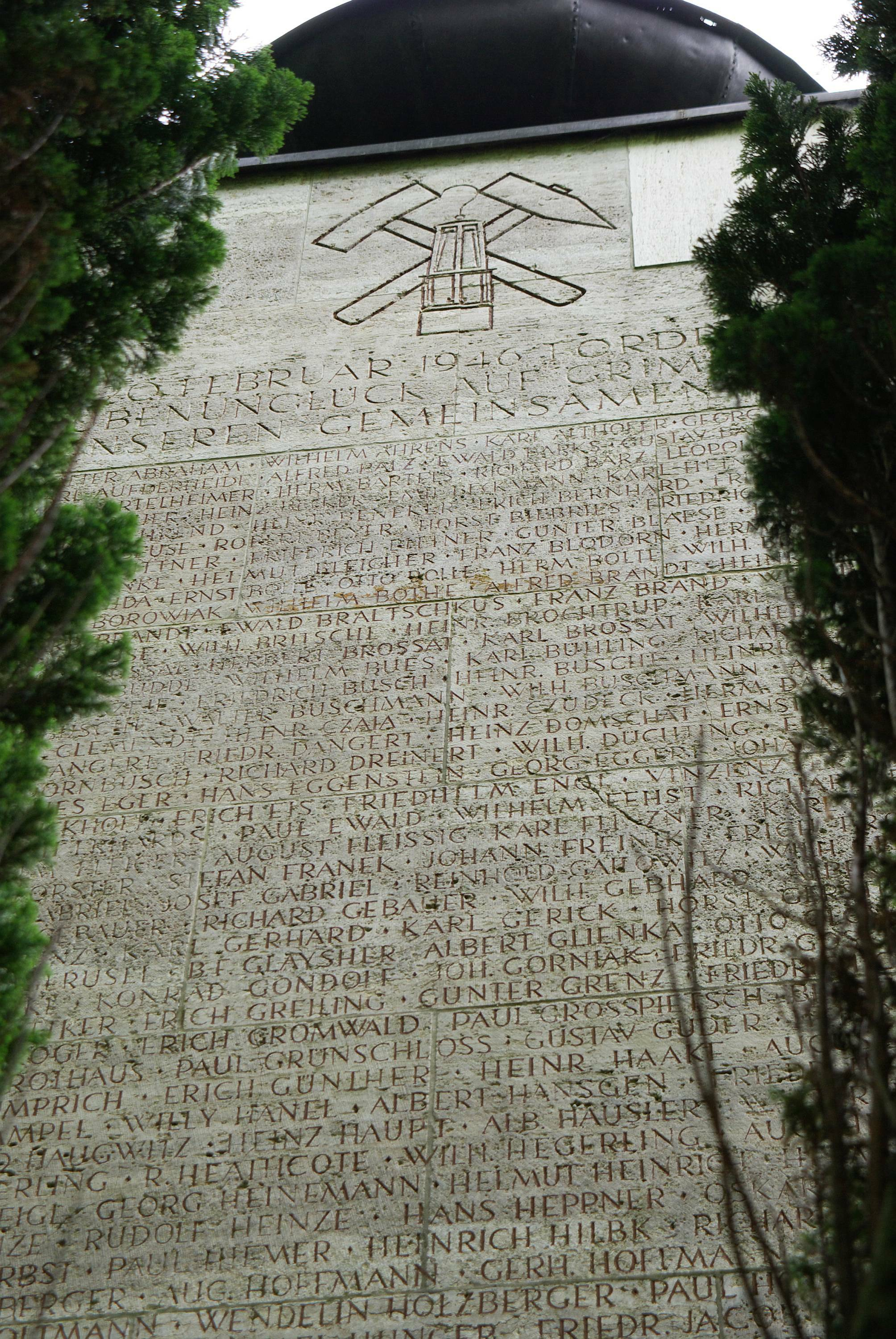 Gedenkstätte für die Opfer des Grubenunglücks auf Schacht Grimberg 3/4, Bergkamen, Nordrhein-Westfalen